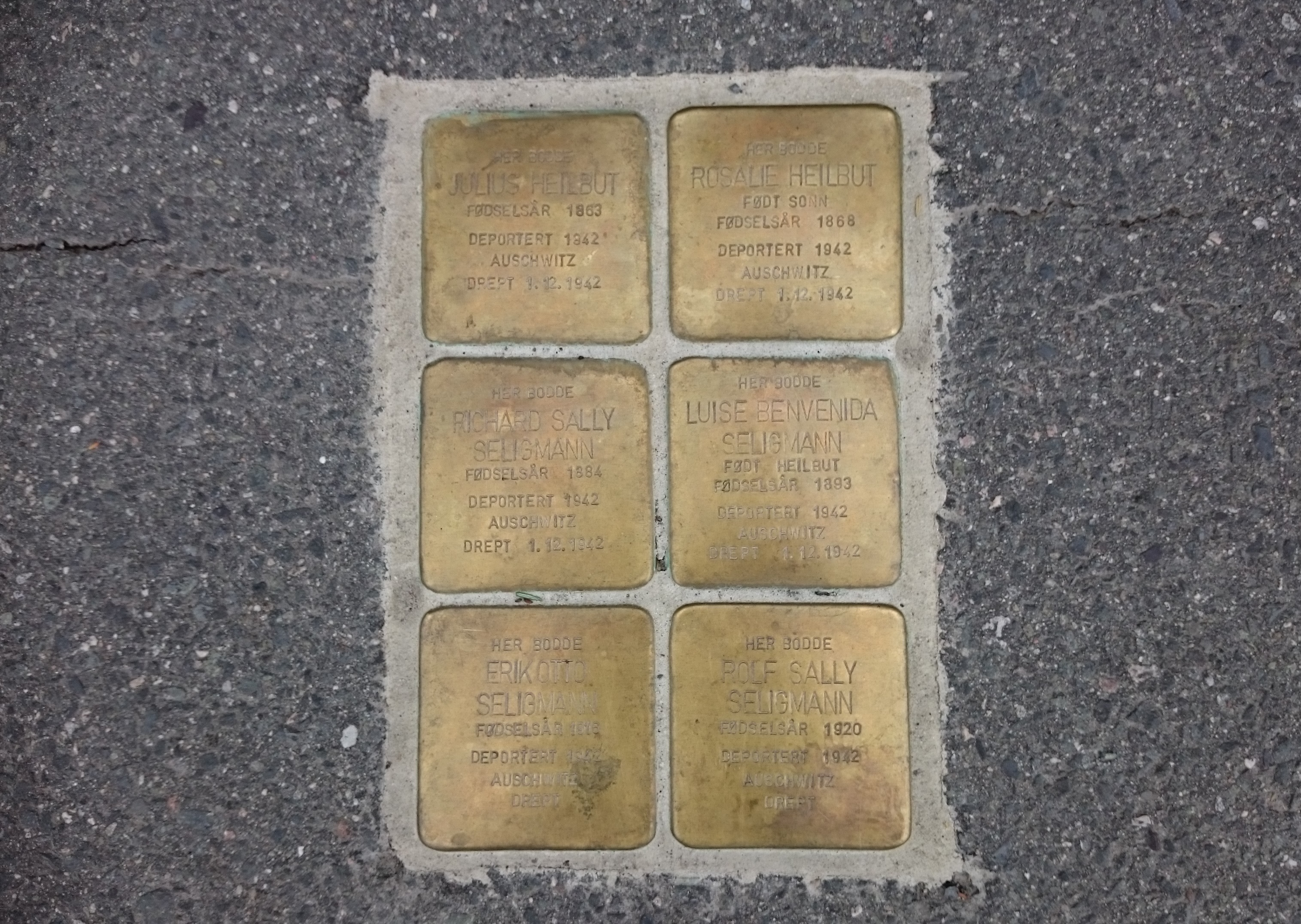 Minnesmerke, snublestener, over Erik Otto Seligmann, Luise Benvenida Seligmann, Richard Sally Seligmann, Rolf Sally Seligmann, Julius Heilbut og Rosalie Heilbut utenfor deres bolig i Irisveien 20 på Tåsen i Oslo.